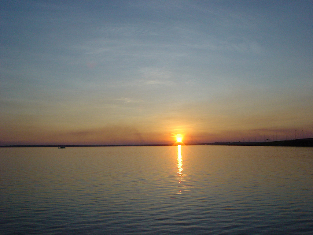 Palmas/TO/Brazil